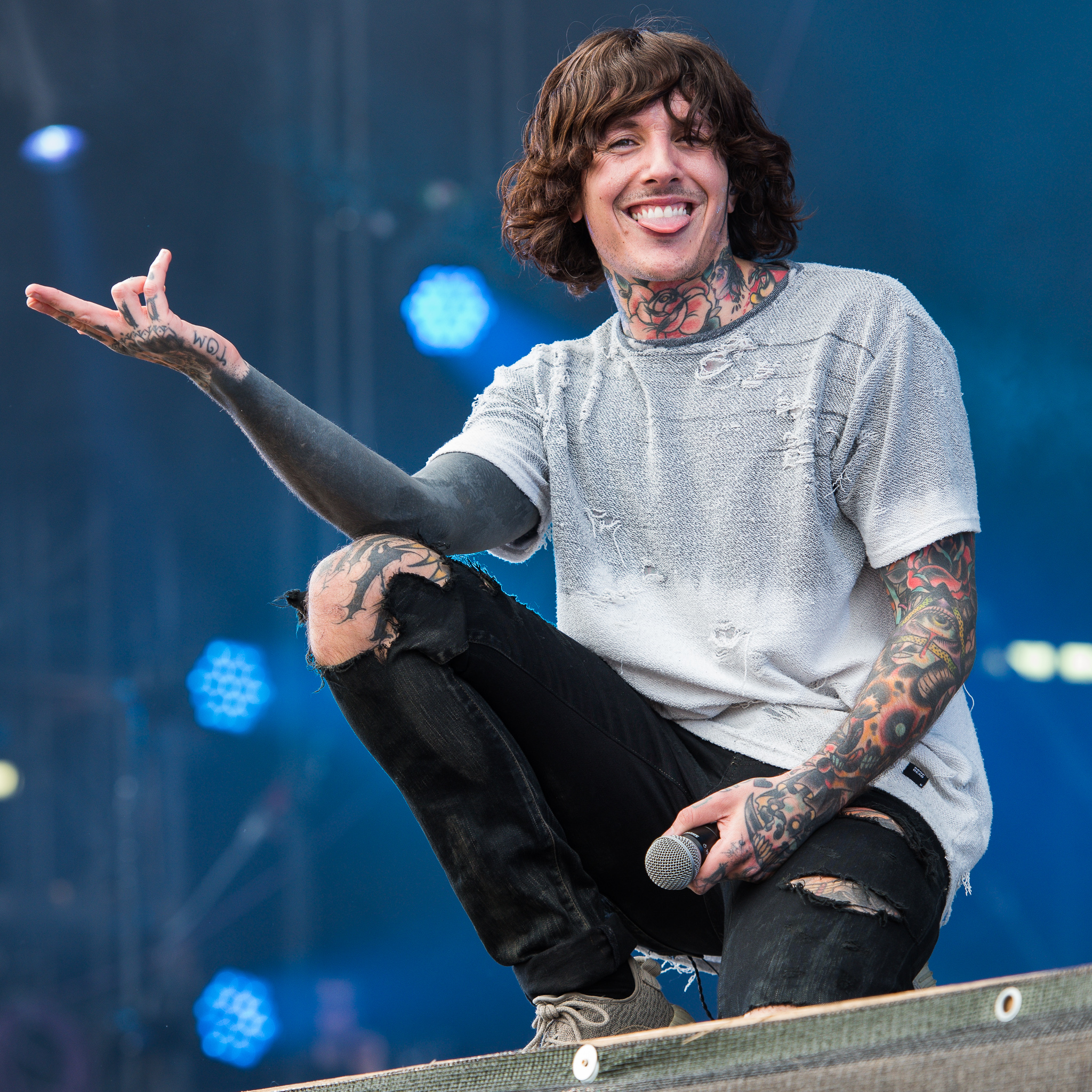 ARGO-Konzerte,Bring Me The Horizon,Festival,Konzert,Livekonzert,Livemusik,Musik,Oliver Scott Sykes,RiP,Rock im Park 2016,Seat Zeppelin Stage